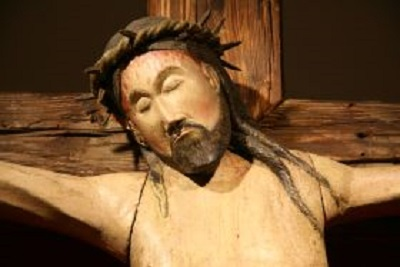 Romanisches Kruzifix im Diözesanmuseum Graz, um 1220